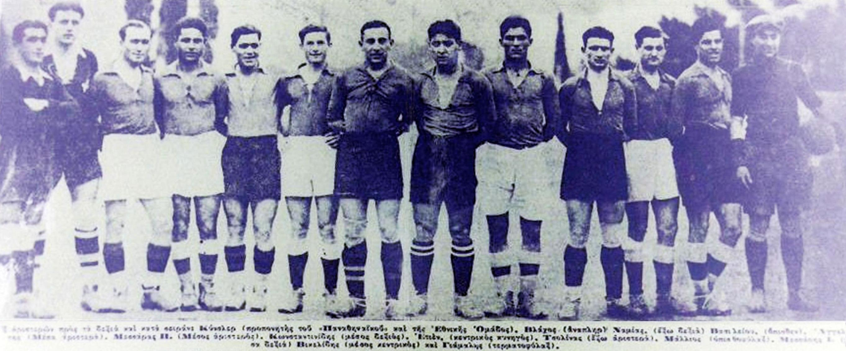 Η πρώτη επίσημη εθνική ομάδα ποδοσφαίρου της Ελλάδας το 1929